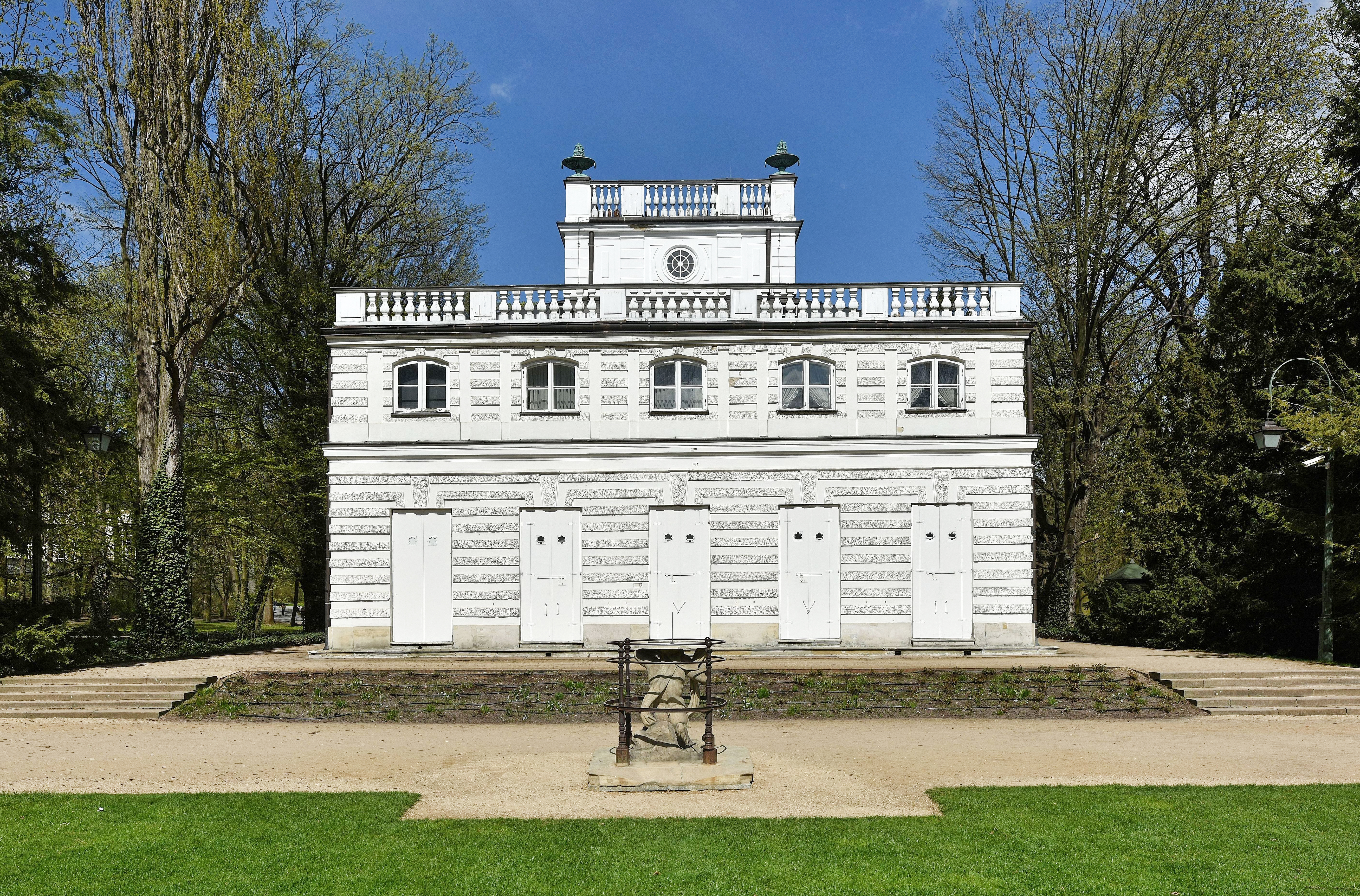 Biały Domek w Łazienkach Królewskich w Warszawie